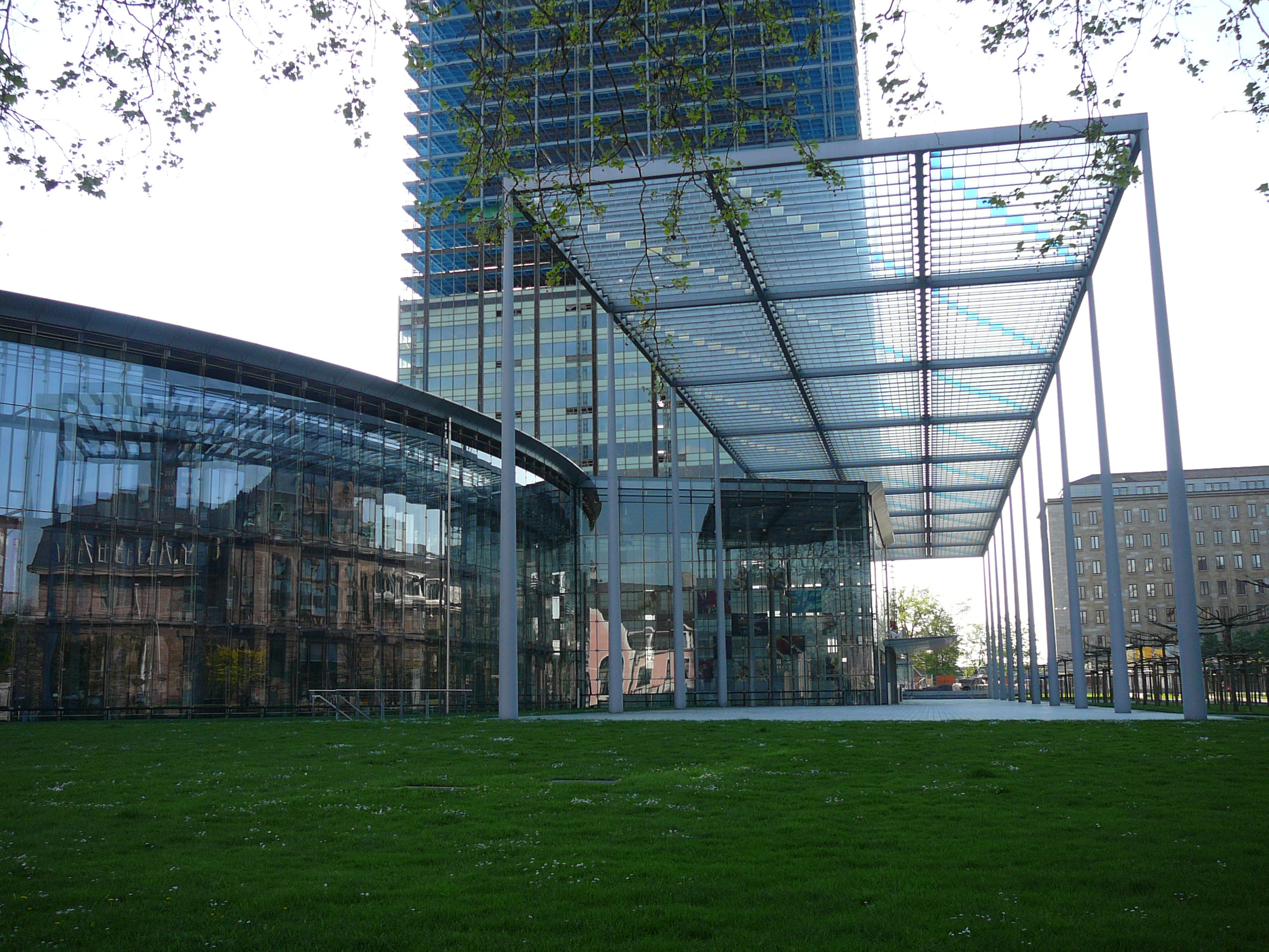 Carl-Duisberg-Park, Kaiser-Wilhelm-Allee, Leverkusen